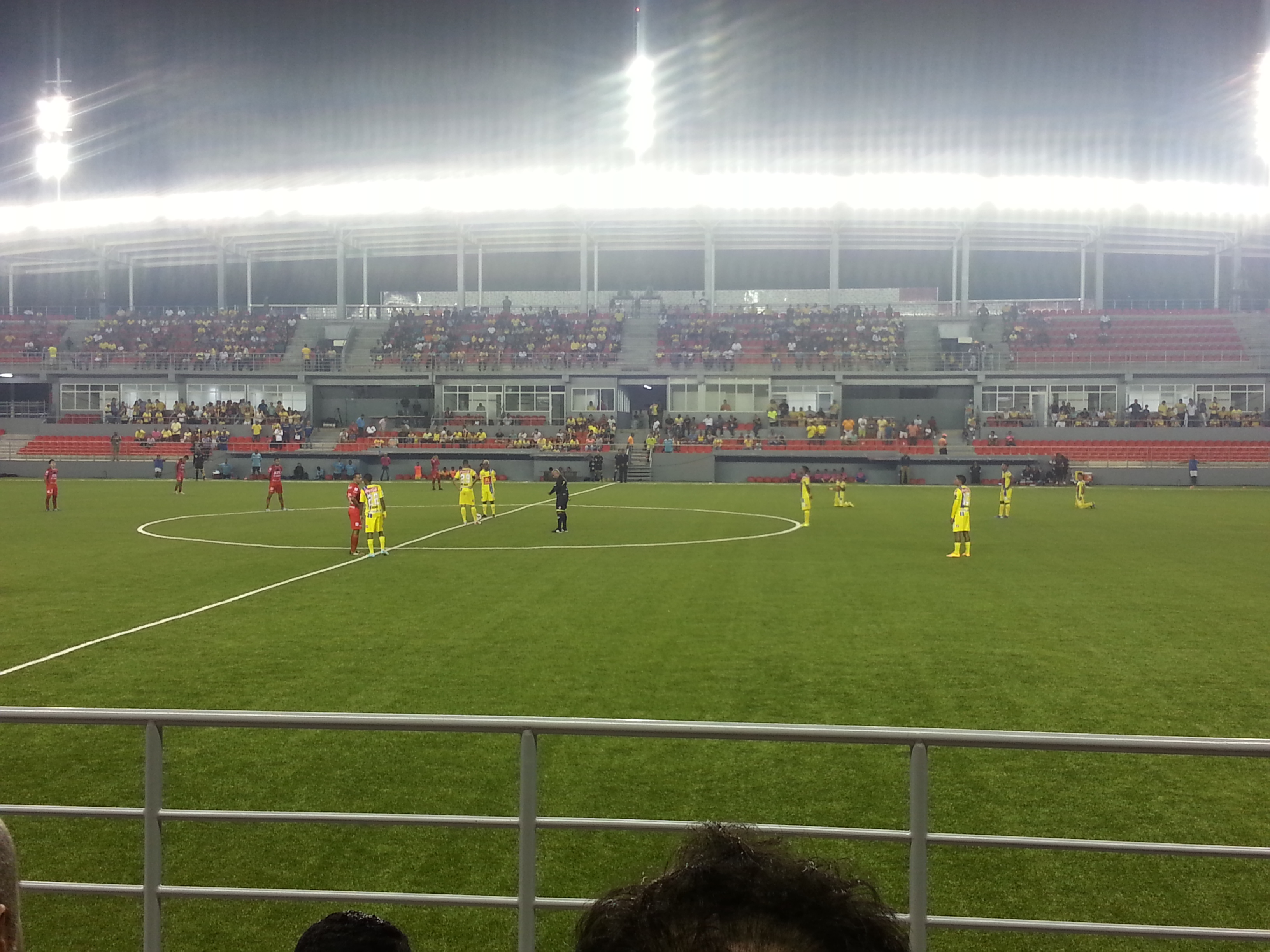 Semifinal Chorrillo FC-San Francisco FC en la Liga Panameña de Fútbol Apertura 2014